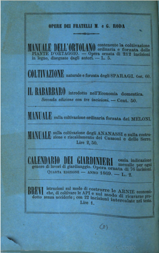 Retro di copertina. Dal volume "Corso teorico-pratico sopra la coltivazione e potatura delle principali piante fruttifere" dei fratelli Marcellino e Pietro Giuseppe Roda, 3a ed., 1869.